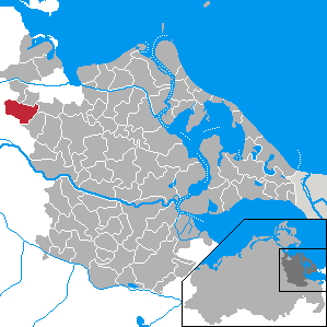 Dersekow, Landkreis Ostvorpommern, Mecklenburg-Vorpommern